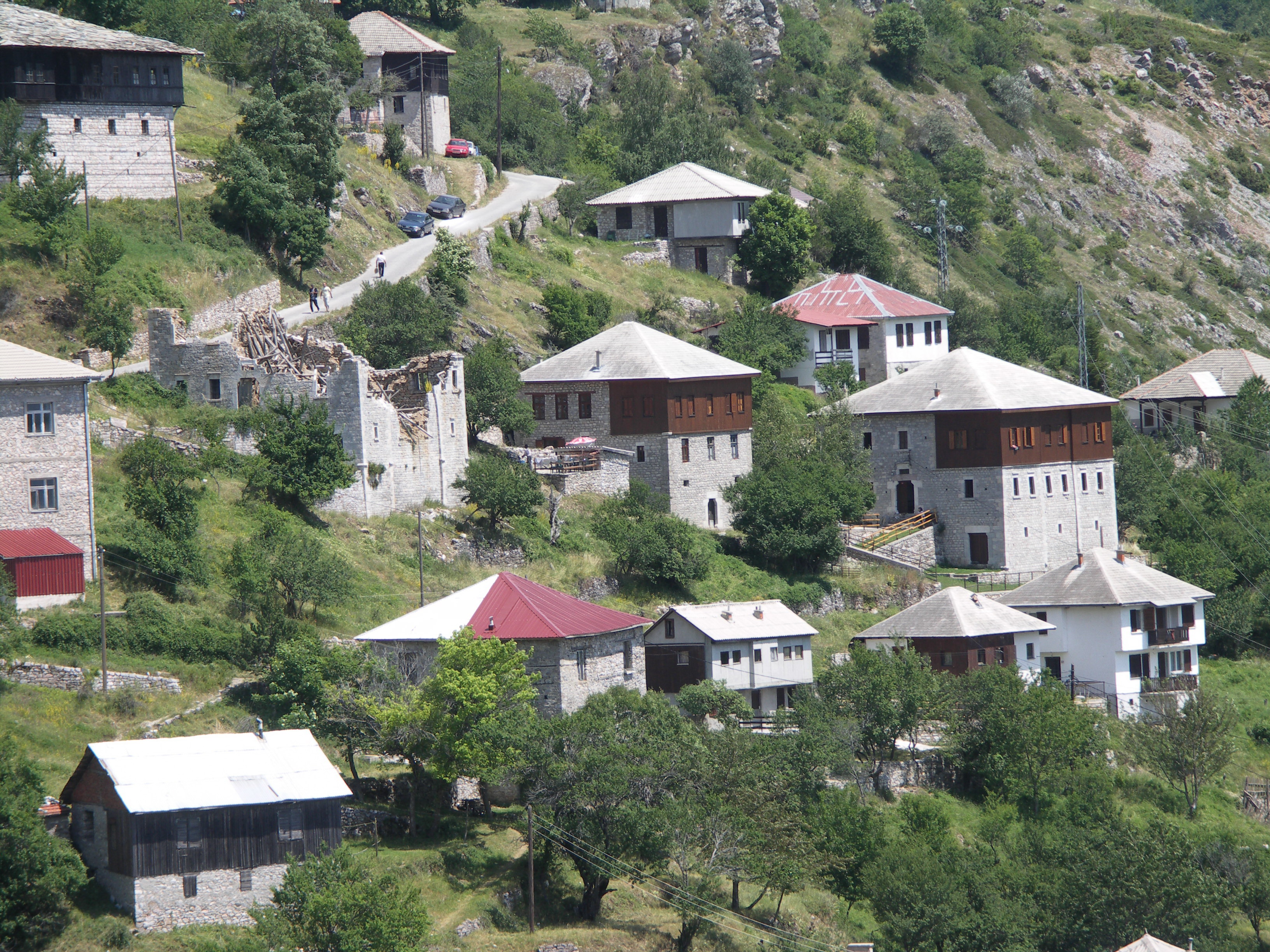 Galičnik